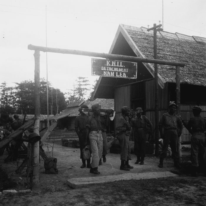 negatief. Kazerne van het KNIL detachement in Namlea